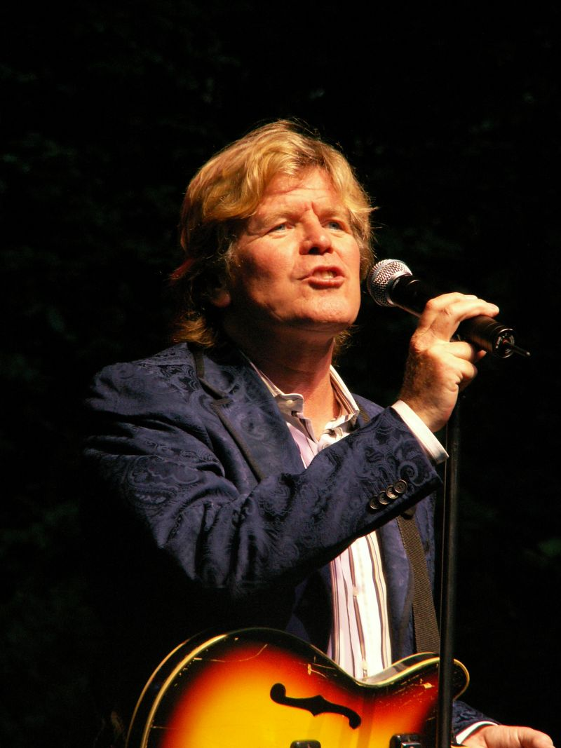 Peter Noone live, 2007.